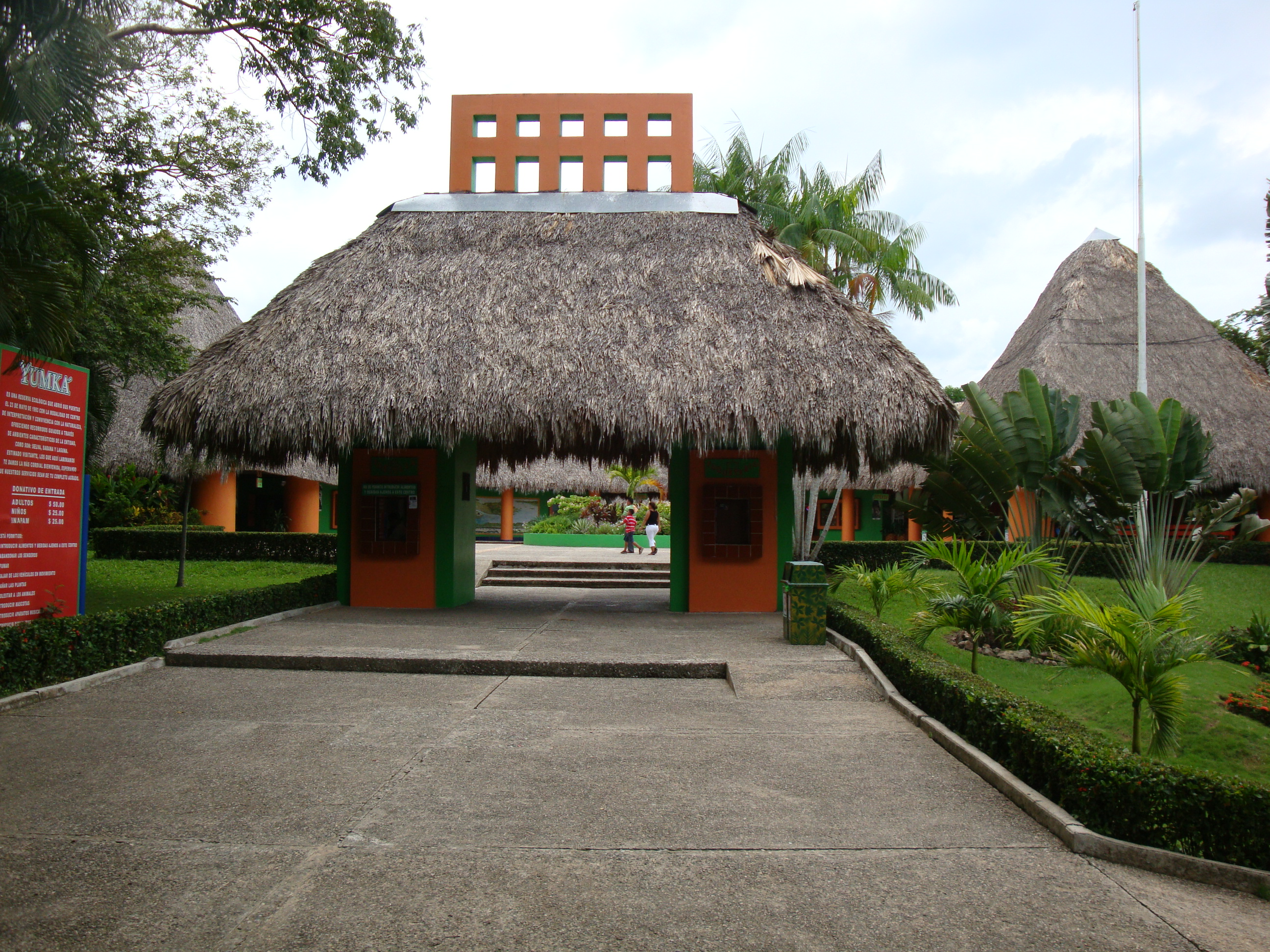 Entrada principal al Centro de Interpretación de la Naturaleza "Yumka'" en la ciudad de Villahermosa, Tabasco, México.